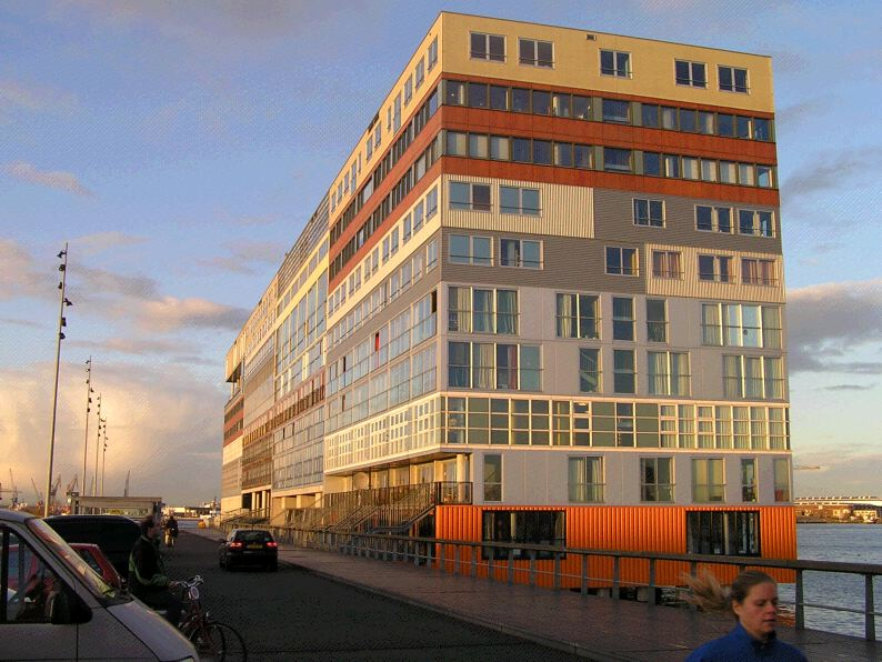 Woningbouw aan de Westerdoksdijk (Silodam) te Amsterdam. MVRDV is een Nederlands architectenbureau, opgericht in 1991 en gevestigd in Rotterdam.